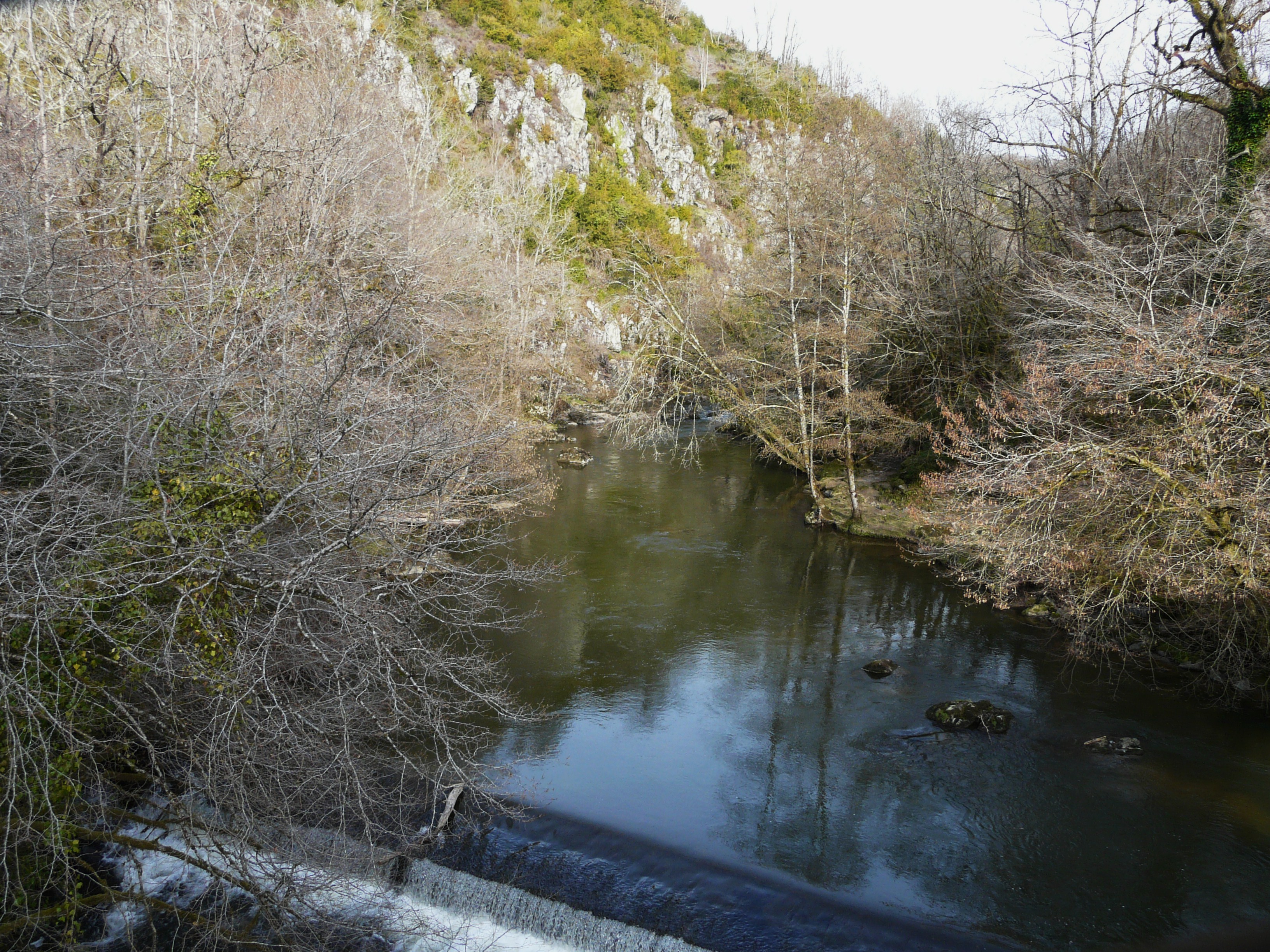 Les gorges de l'Auvézère en amont du lieu-dit le Moulin, Saint-Mesmin, Dordogne, France